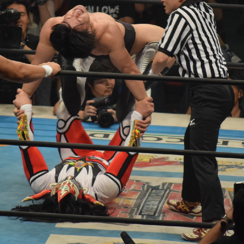 2015年7月5日 大阪城ホール 「DOMINION 7.5 in OSAKA-JO HALL」 田中翔にロメロスペシャルを極める獣神サンダー・ライガー